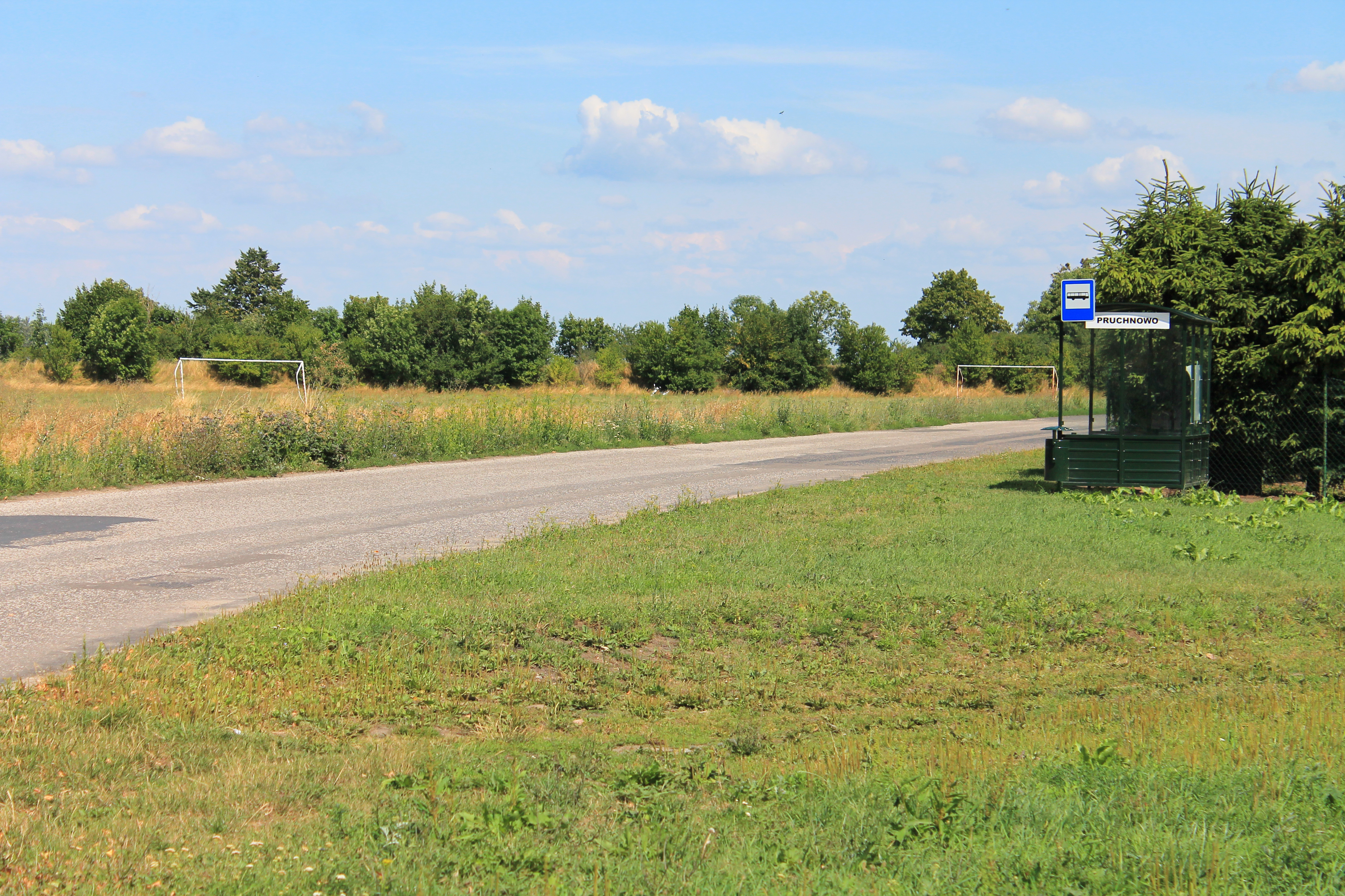 Przystanek autobusowy przy skrzyżowaniu we wsi Pruchnowo, województwo wielkopolskie